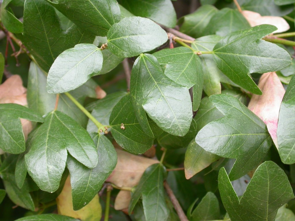 Acer sempervirens leaves - Feuilles d'érable de Crète